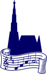 Logo der Chorvereinigung "Jung-Wien"